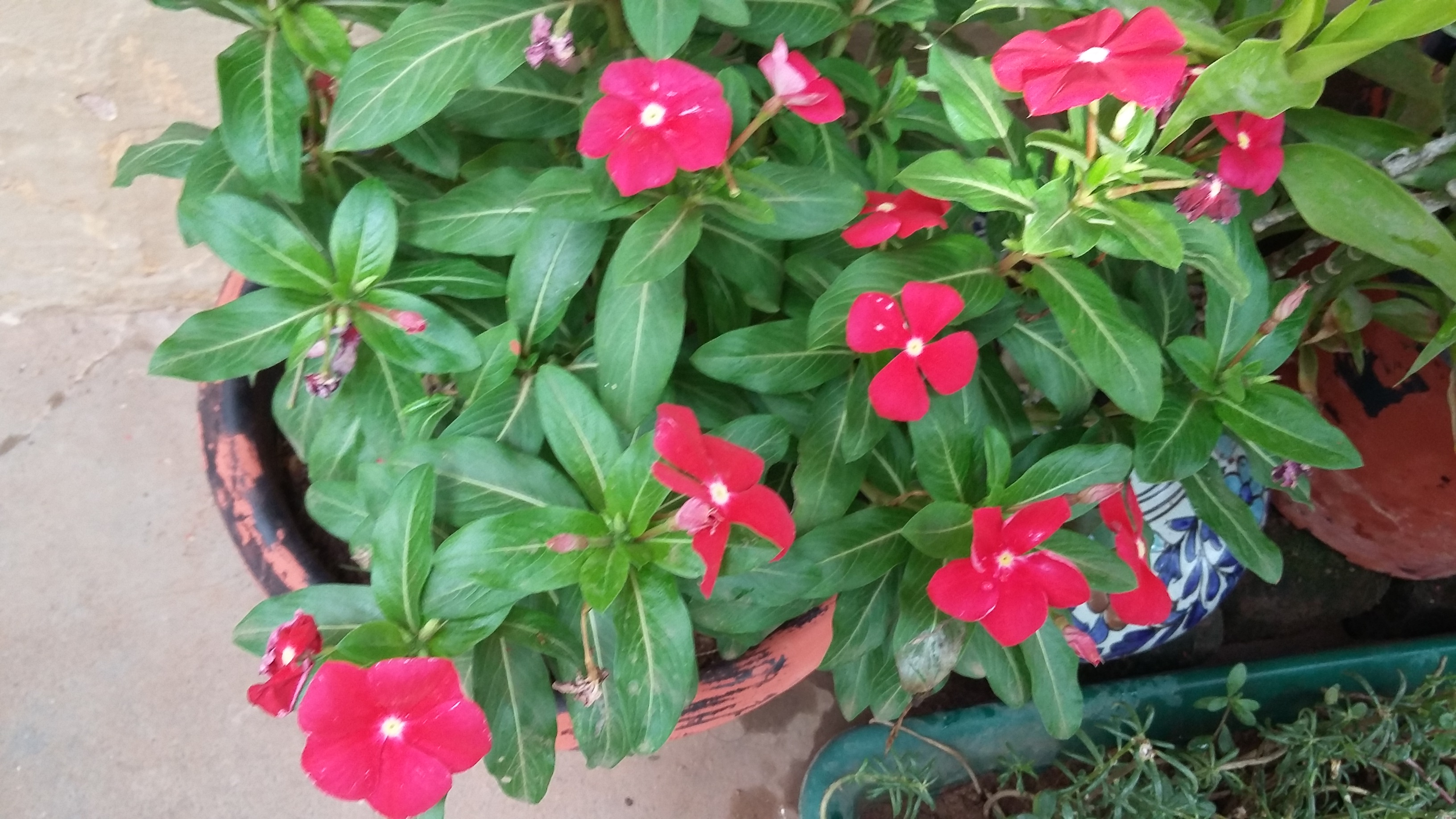 Cultivero rojo de Madagascar Bígaro